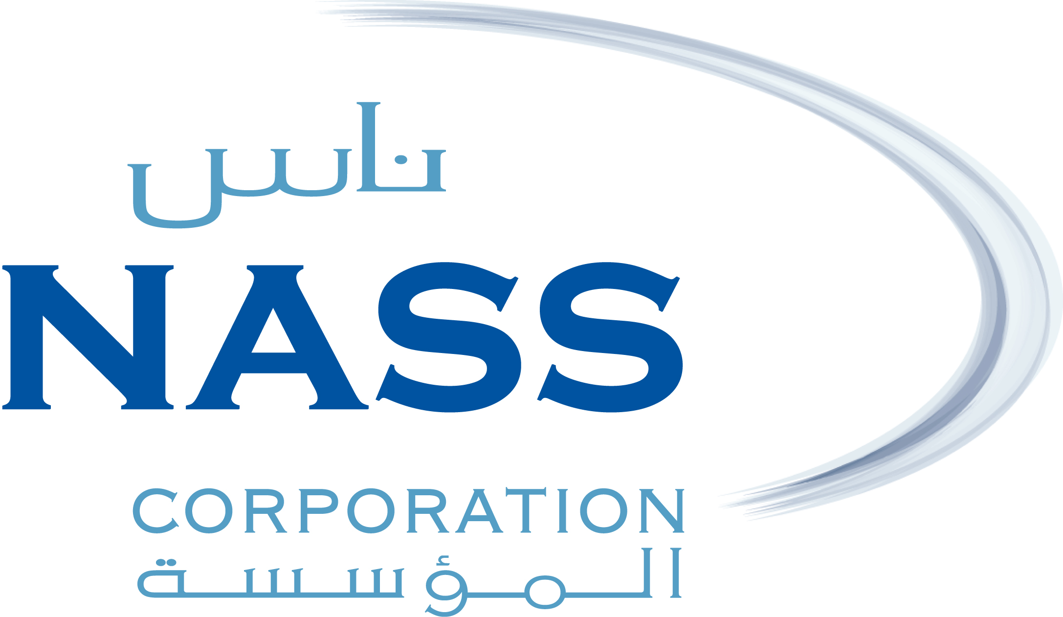 客家語/Hak-kâ-ngî: Nass Corp. logo